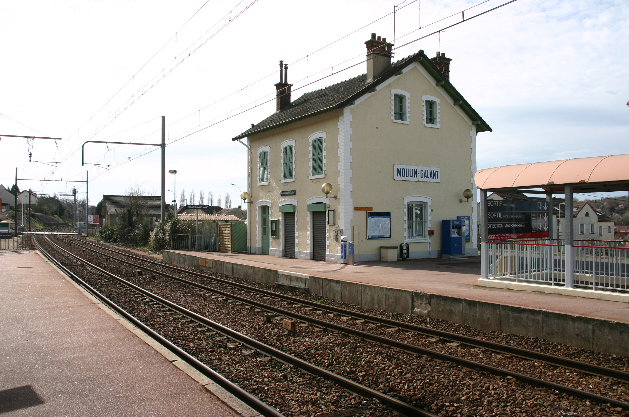 La gare de Moulin-Galant, Corbeil-Essonnes, département de l'Essonne (France)